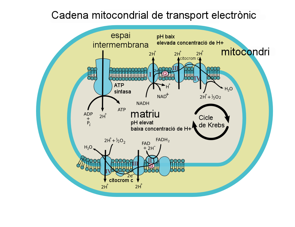 Cadena mitocondrial de transport electrònic.